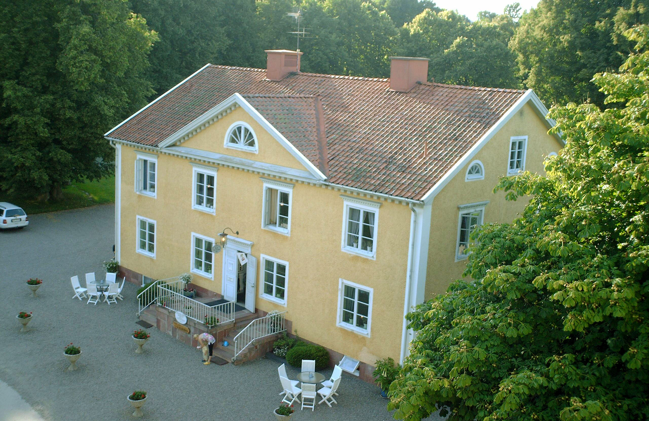 Olshammar Sweden